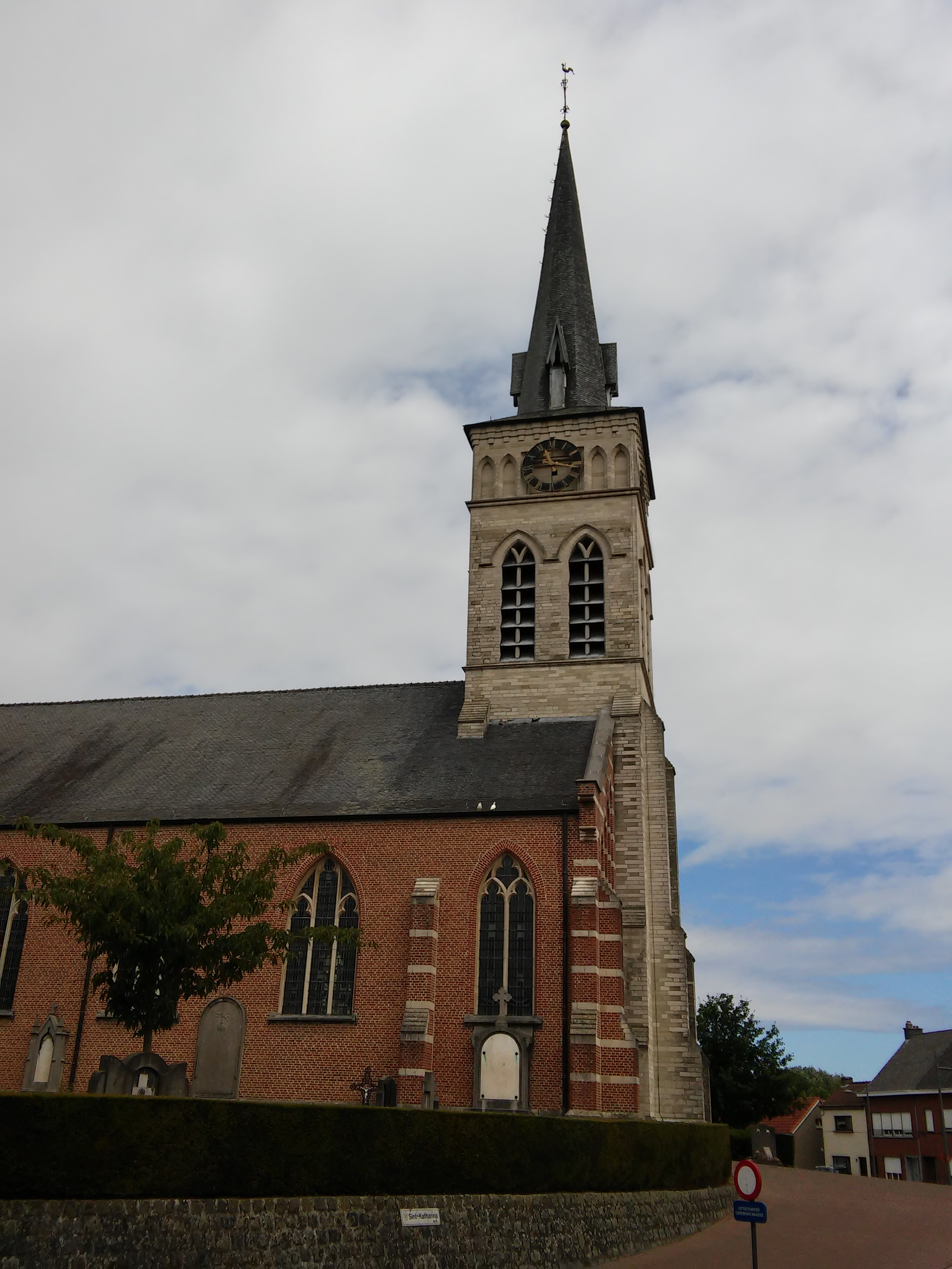 Heilige Katharinakerk, Ruisbroek (Puurs)